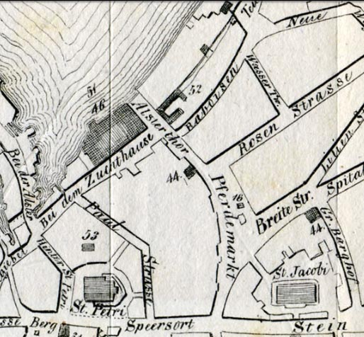 Ausschnitt aus F. H. Neddermeyer: Topographie der Freien und Hanse Stadt Hamburg, 1832 von F.H. Neddermeyer, 1813